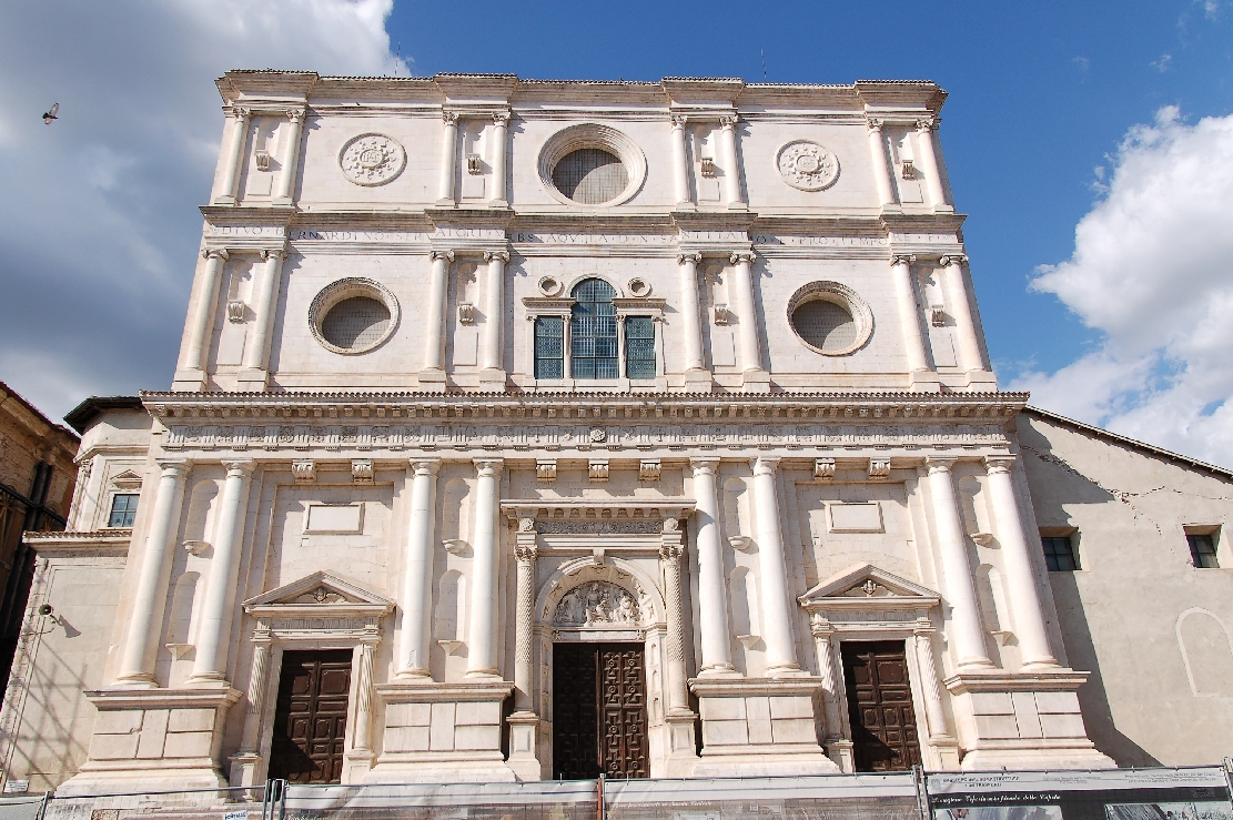 L'Aquila 2011